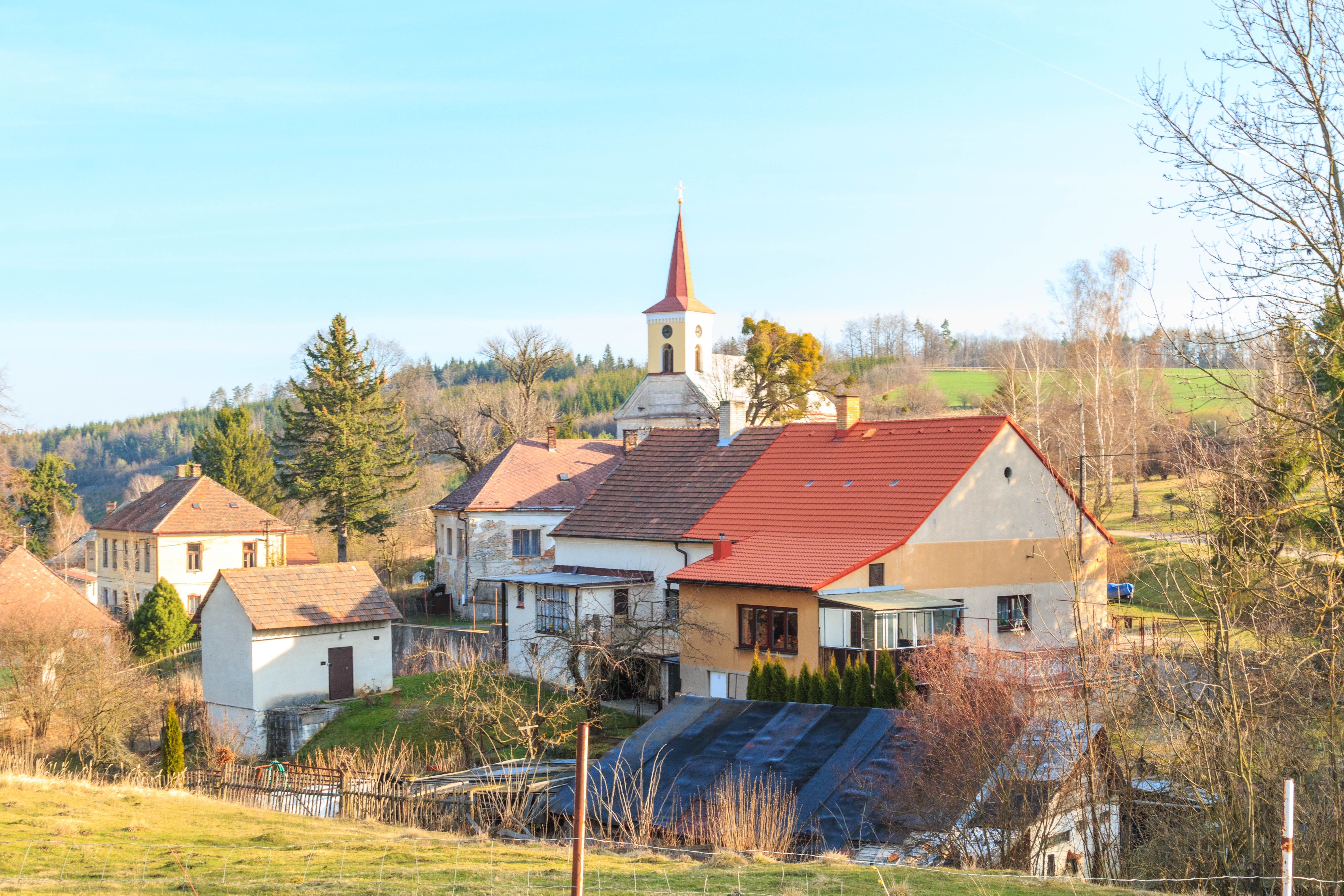 Vápenný Podol - pohled ke kostelu